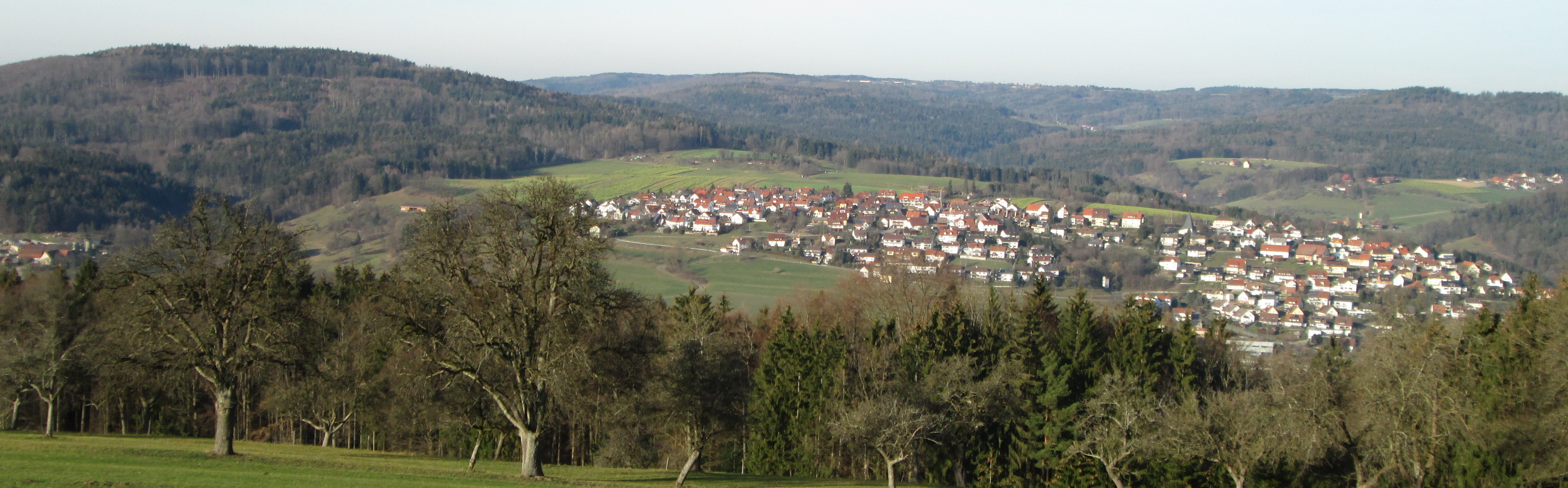 Weitmars gesehen vom Pulzhof (bei Rattenharz). Links der Hohbergkopf, rechts im Hintergrund Strauben.